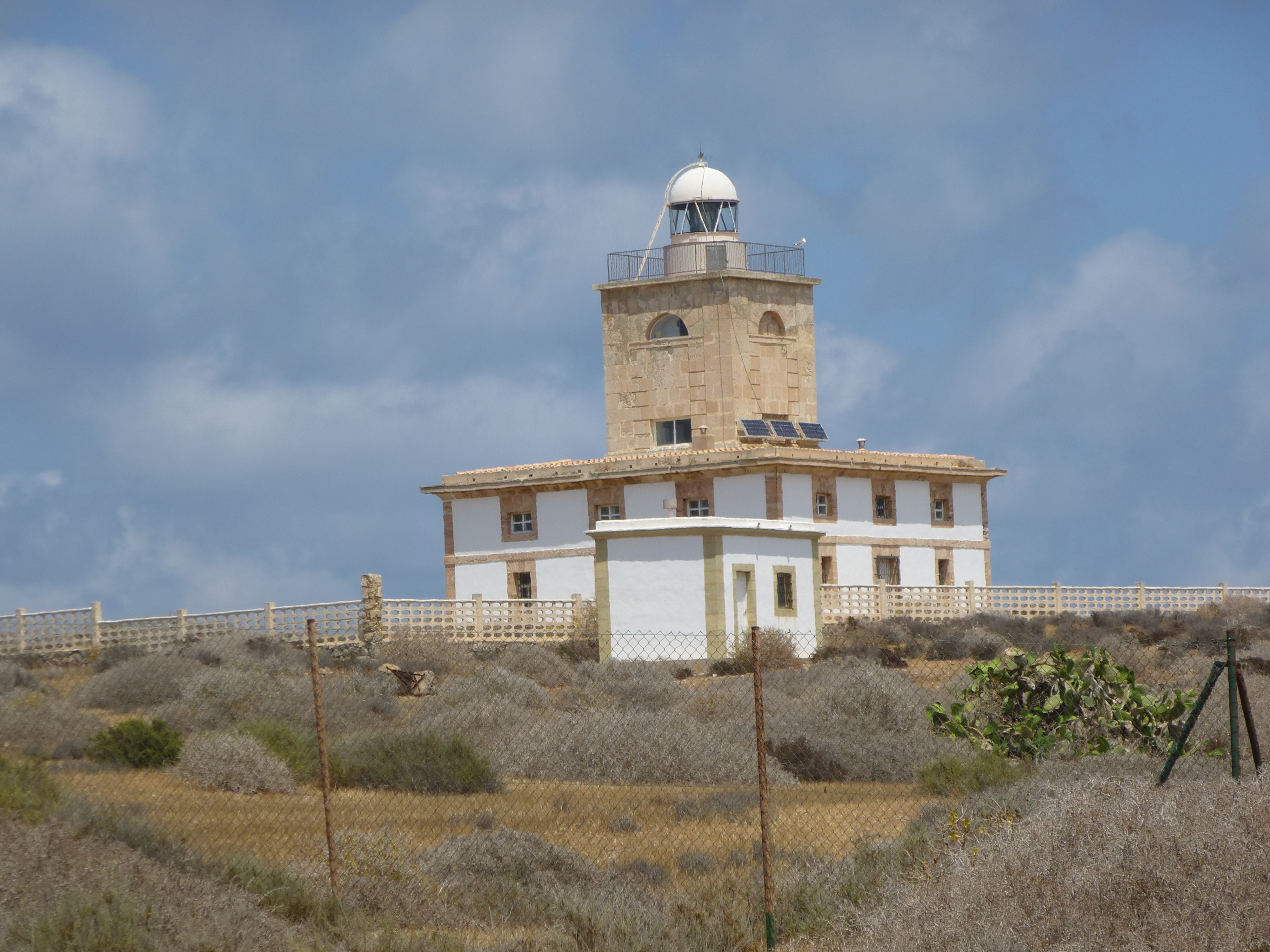 ile de tabarca , le semaphore